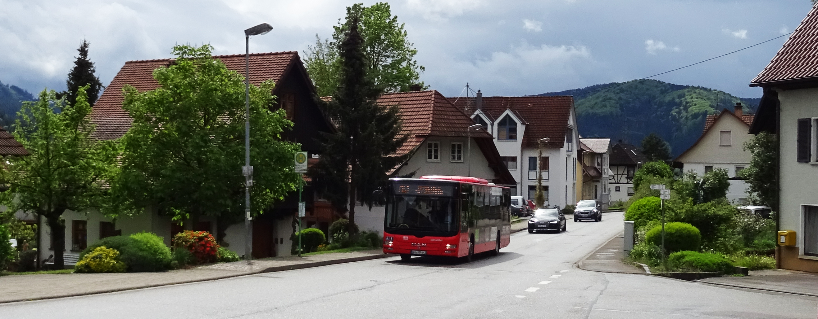 Fischerbach, Bushaltestelle Fischerbach Dorf mit Bus der Linie 7151 (Südwestbus)